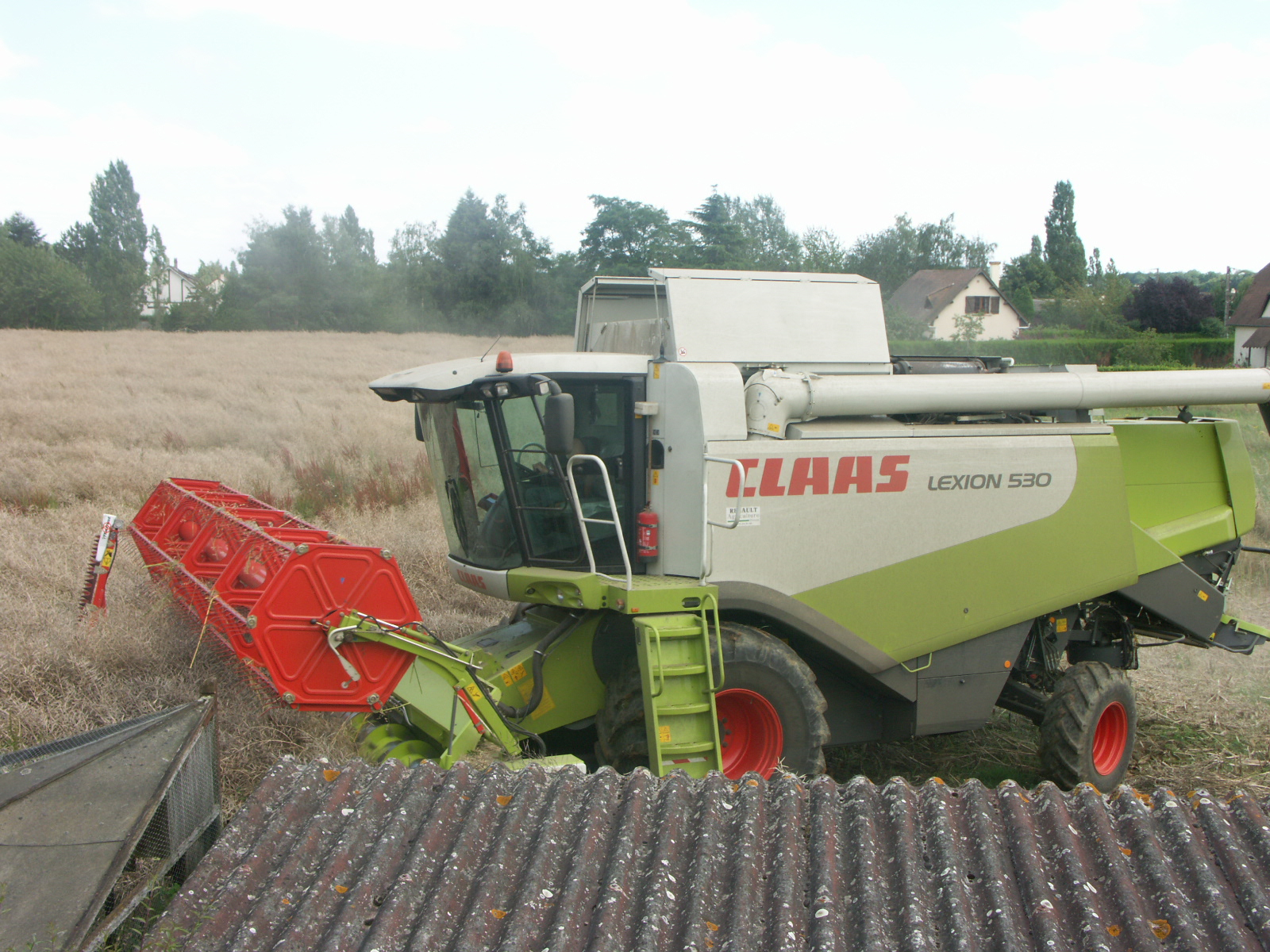 Claas Lexion 530 – Moissonneuse bateuse pendant la moisson 2007